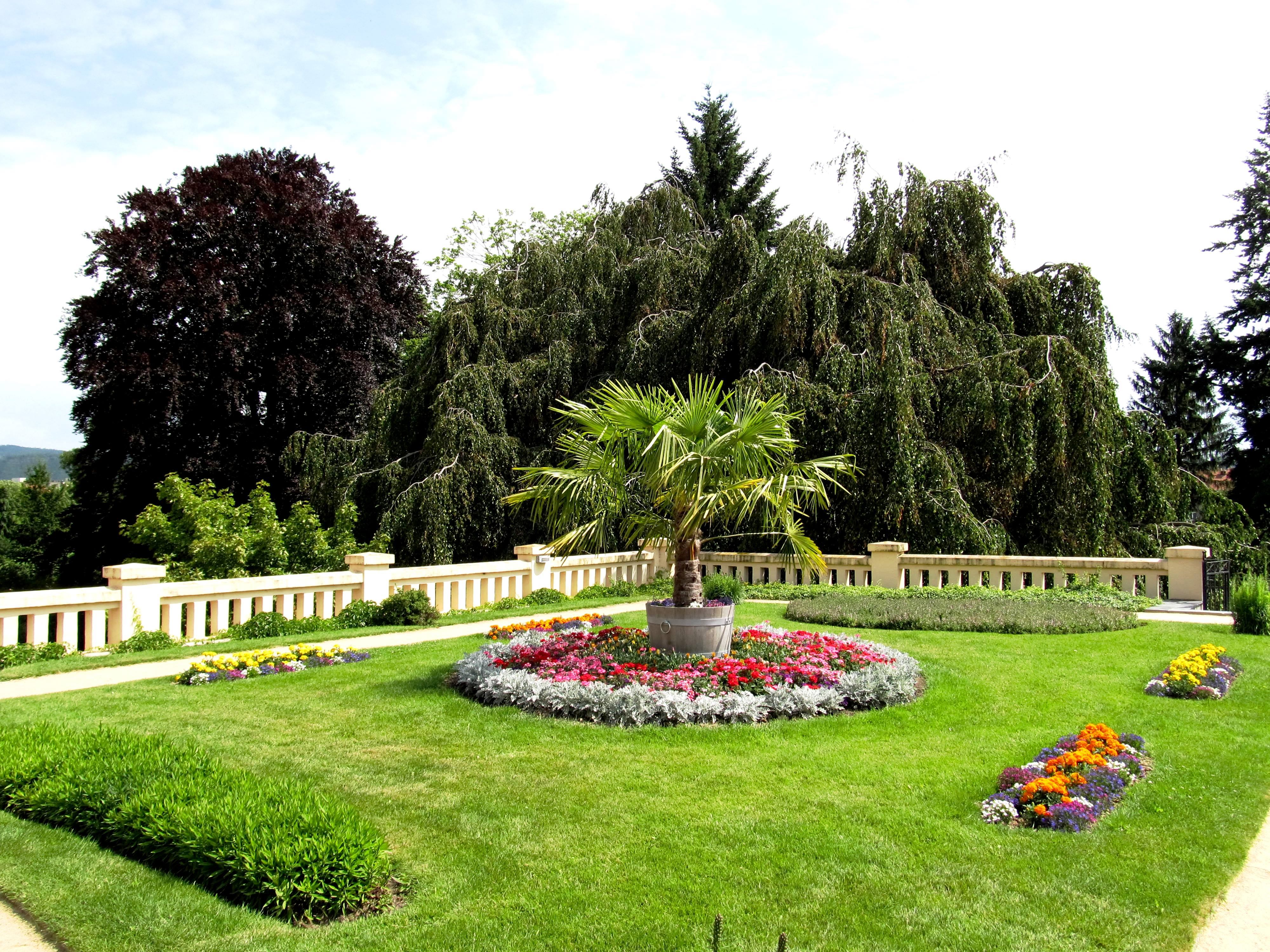 Zámek Lipník nad Bečvou střešní zahrada